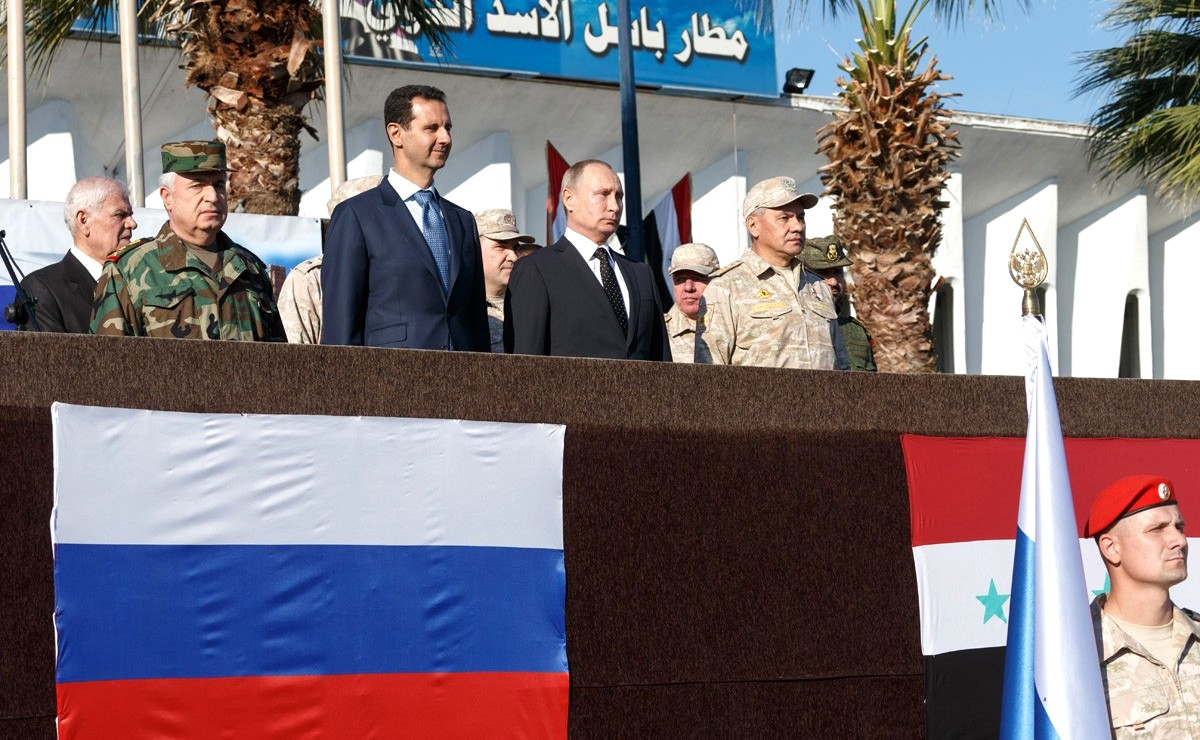 Президент Сирии Башар Асад, Президент России Владимир Путин, Министр обороны России Сергей Шойгу на российской авиабазе Хмеймим